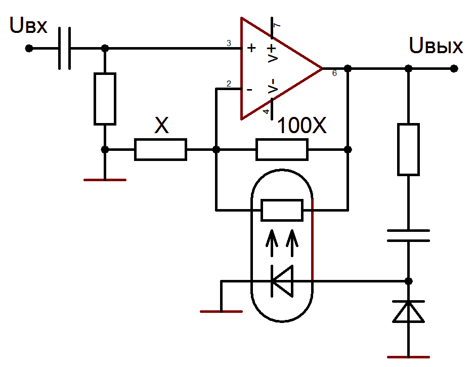 Оптоэлектронный компрессор дальней телефонной связи - СССР, 1970-е годы. По материалам рис. 5.4, с. 323 - Юшин, Оптоэлектронные приборы и их зарубежные аналоги, том 1, М., 1998.